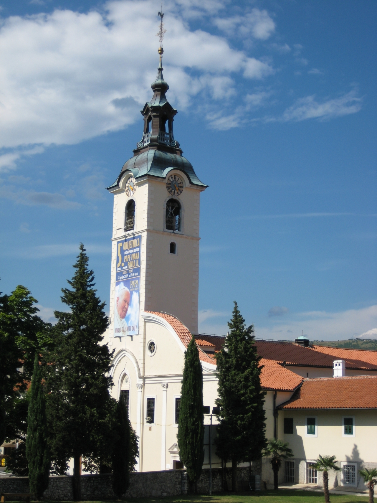 Crkva Gospe Trsatske.